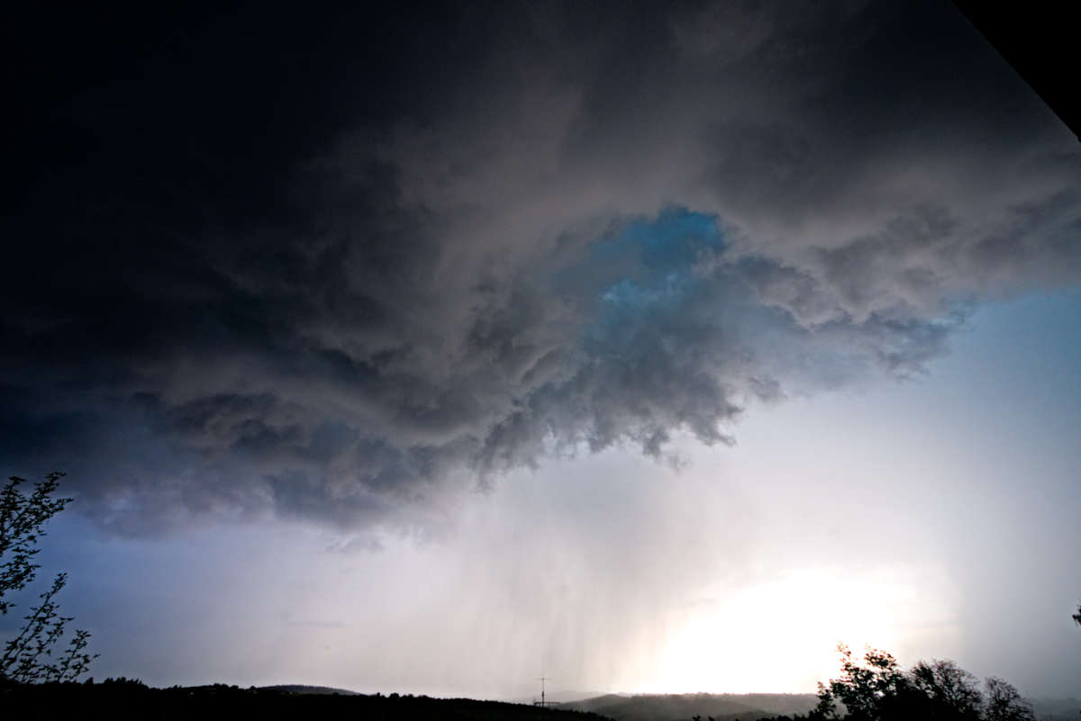 Unwetter am 18. Mai 2017 über dem Landkreis Esslingen mit Starkregen und anschließendem Hagel